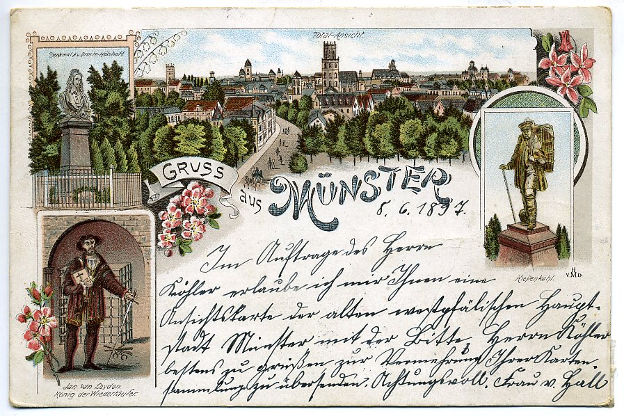 Jan van Leyden (König der Wiedertaüfer) KiepenkählDenkmal a.v Droste-Hülshott